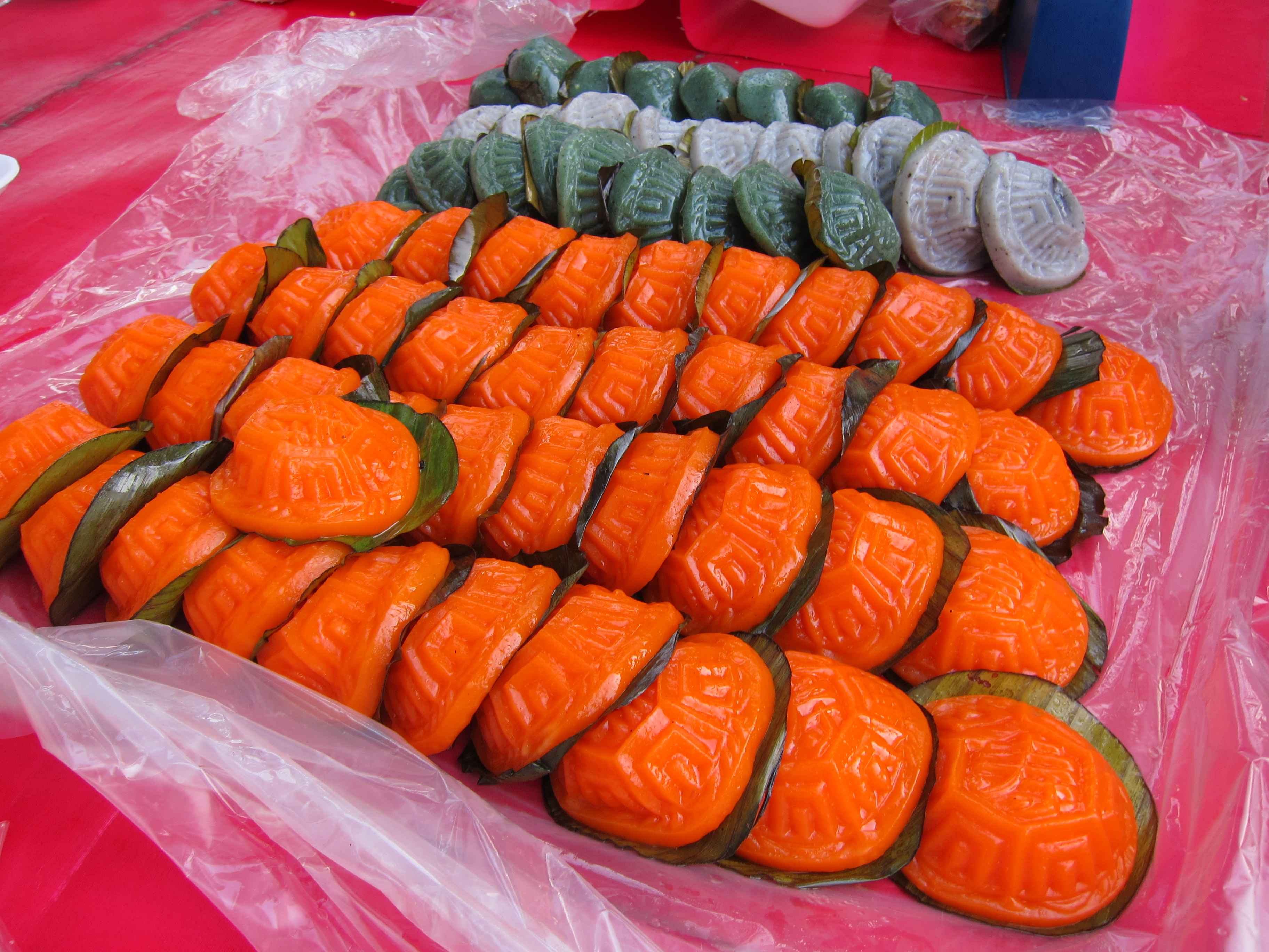 Ang Ku Kueh in Imbi Pasar